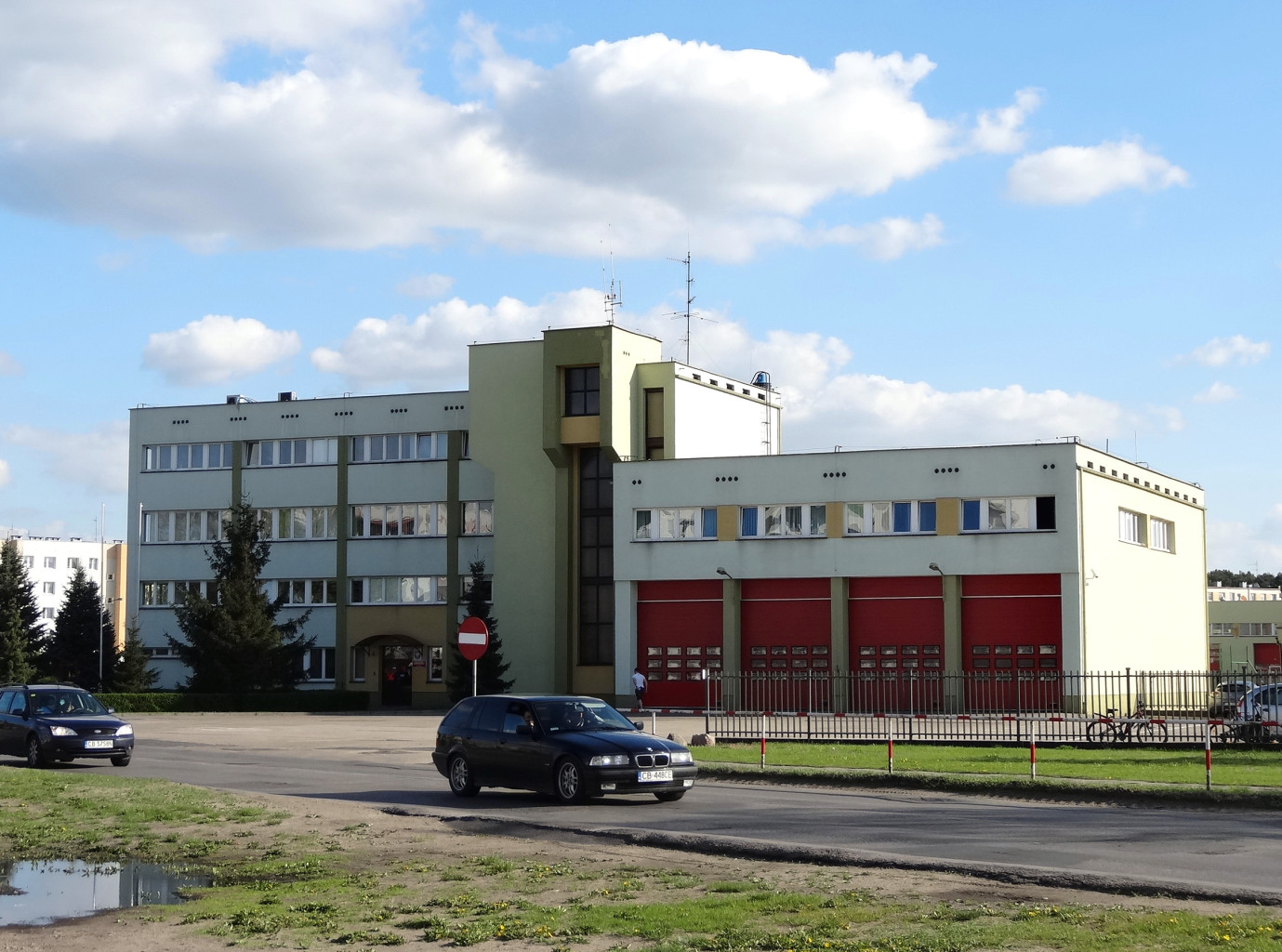 Szkoła Podoficerska Państwowej Straży Pożarnej przy ul. Glinki w Bydgoszczy